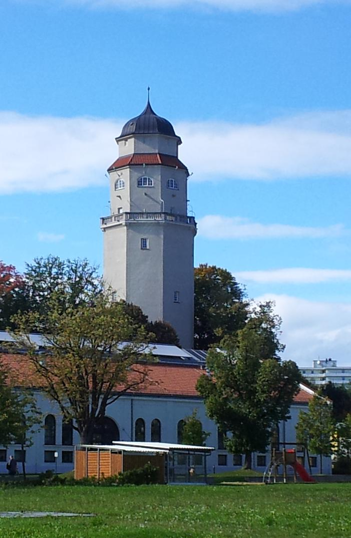 Wasserturm Freising